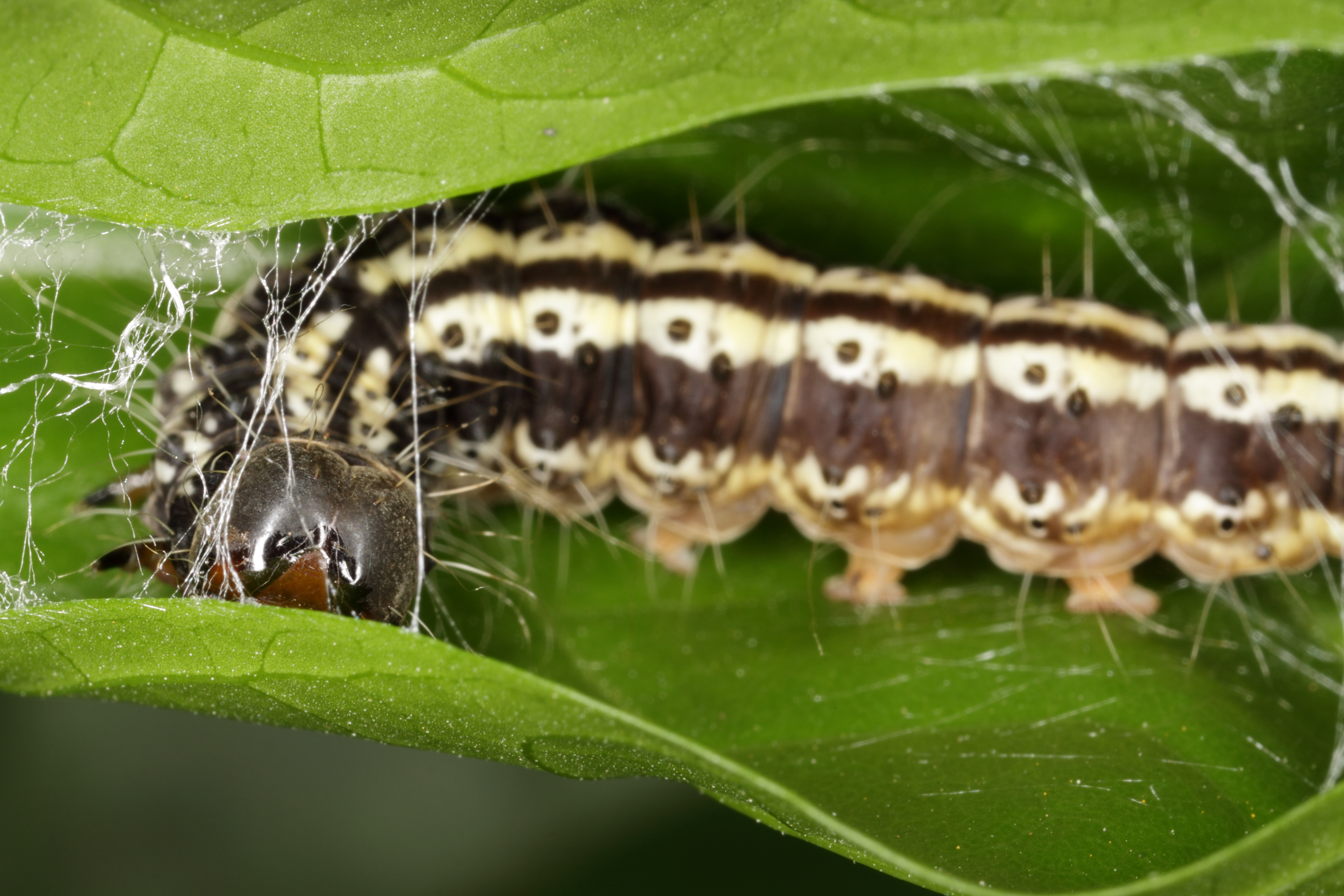 Indonesia, W-Java, Tangerang: vic. Serpong (BSD), 45m asl., 18.03.2011 IMG_0111